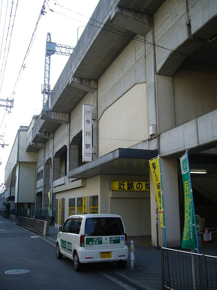 近鉄南大阪線今川駅 高架下東側